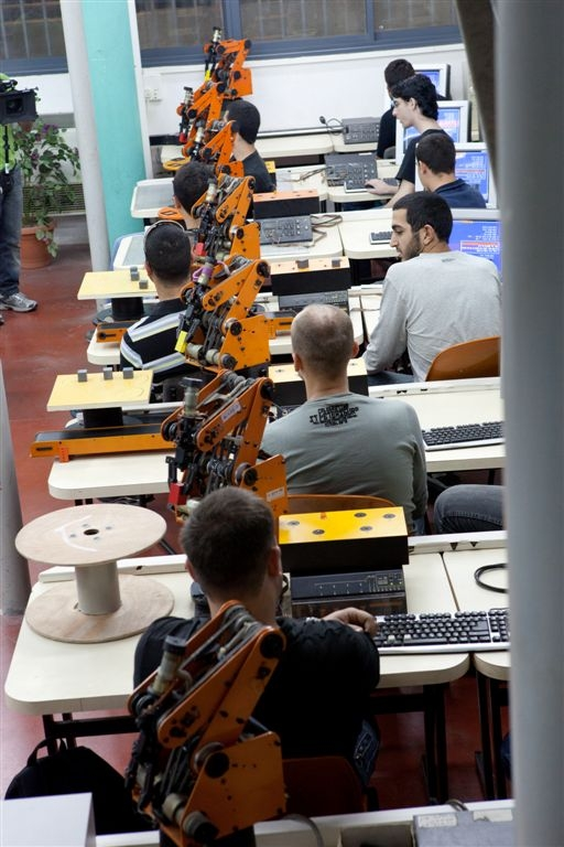 כיתת רובוטיקה